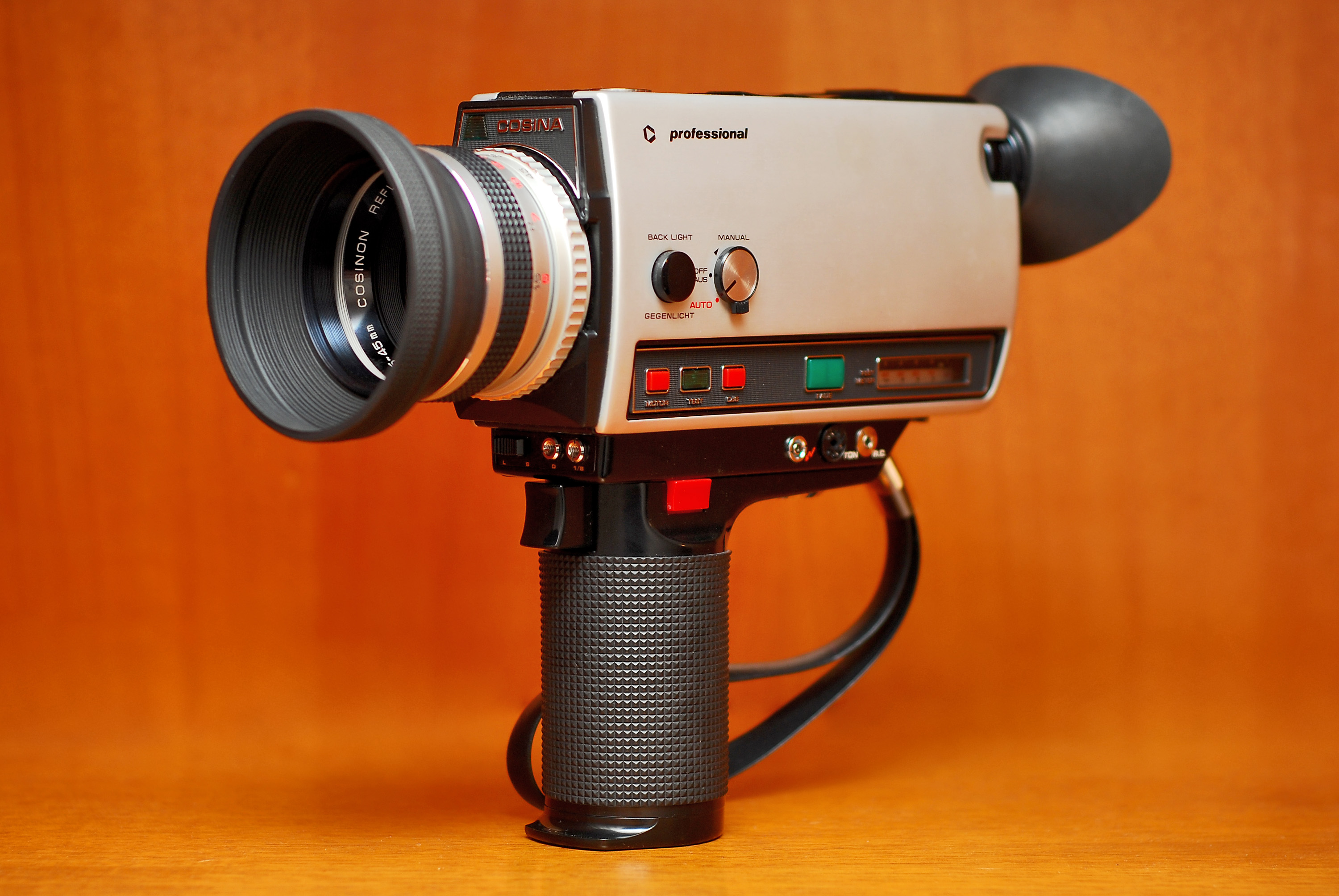 Cosina SSL 766 Macro.